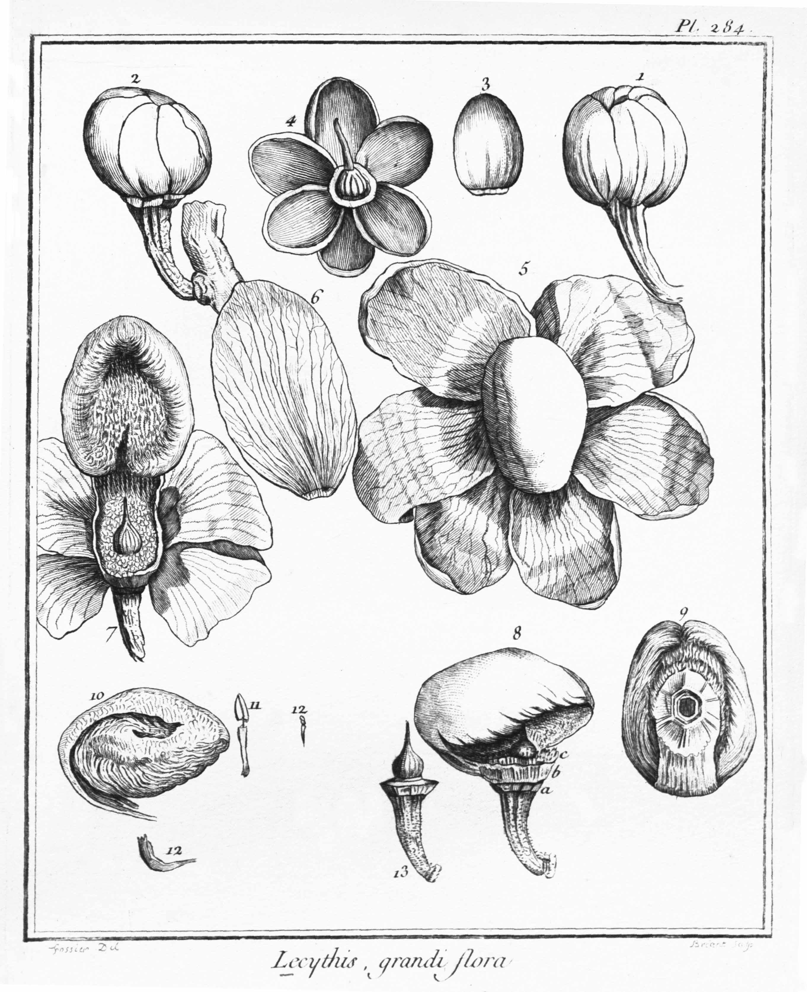 illustration